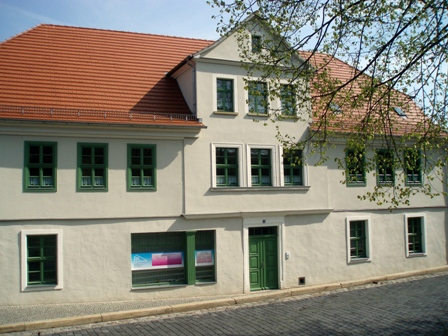 Gerberhaus Nicolaistr. 6 Zeitz